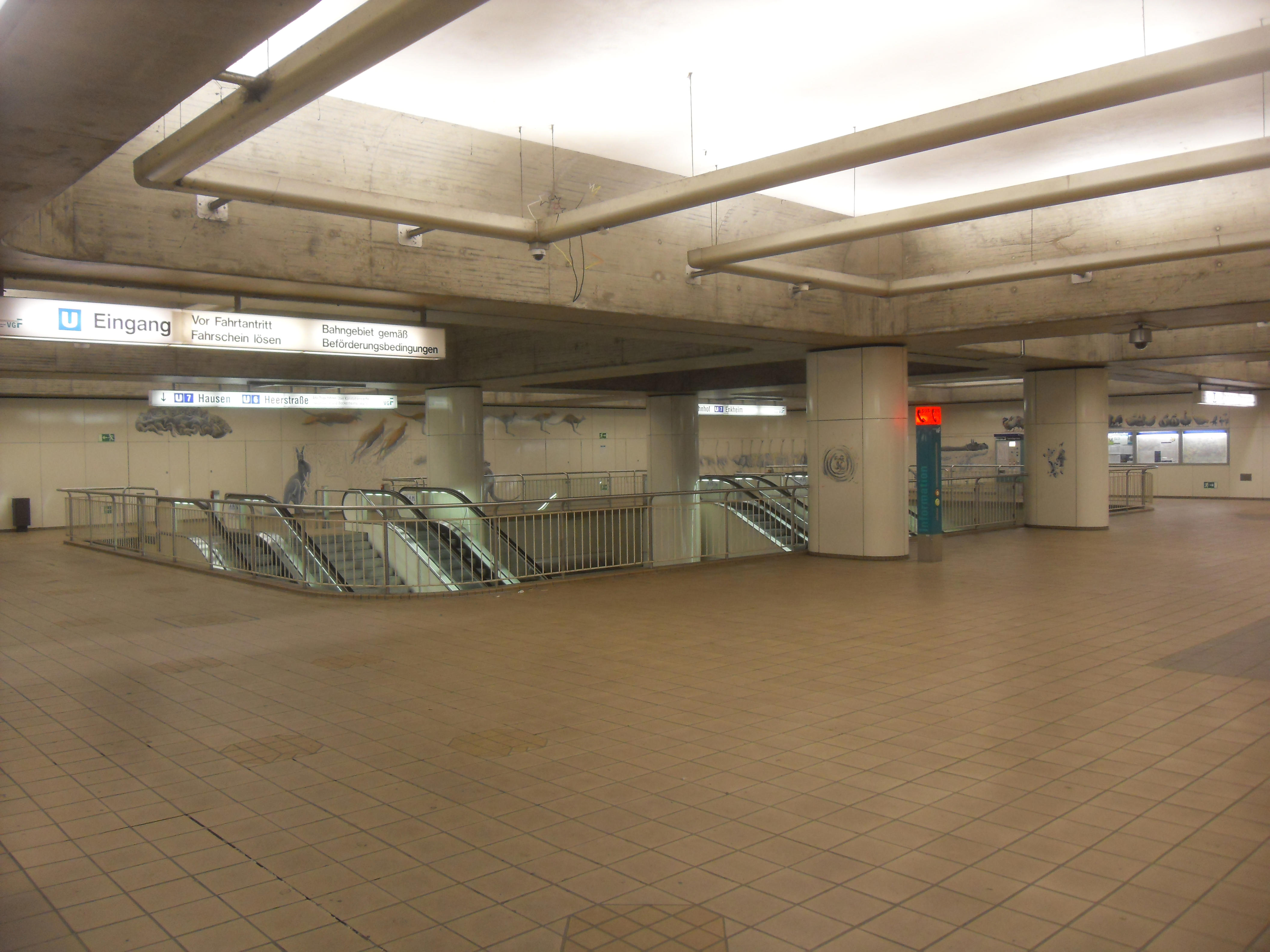 Verteilerebene des U-Bahnhofs Zoo der U-Bahn Frankfurt auf den Linien U 6 und U 7 in Hessen (Deutschland)